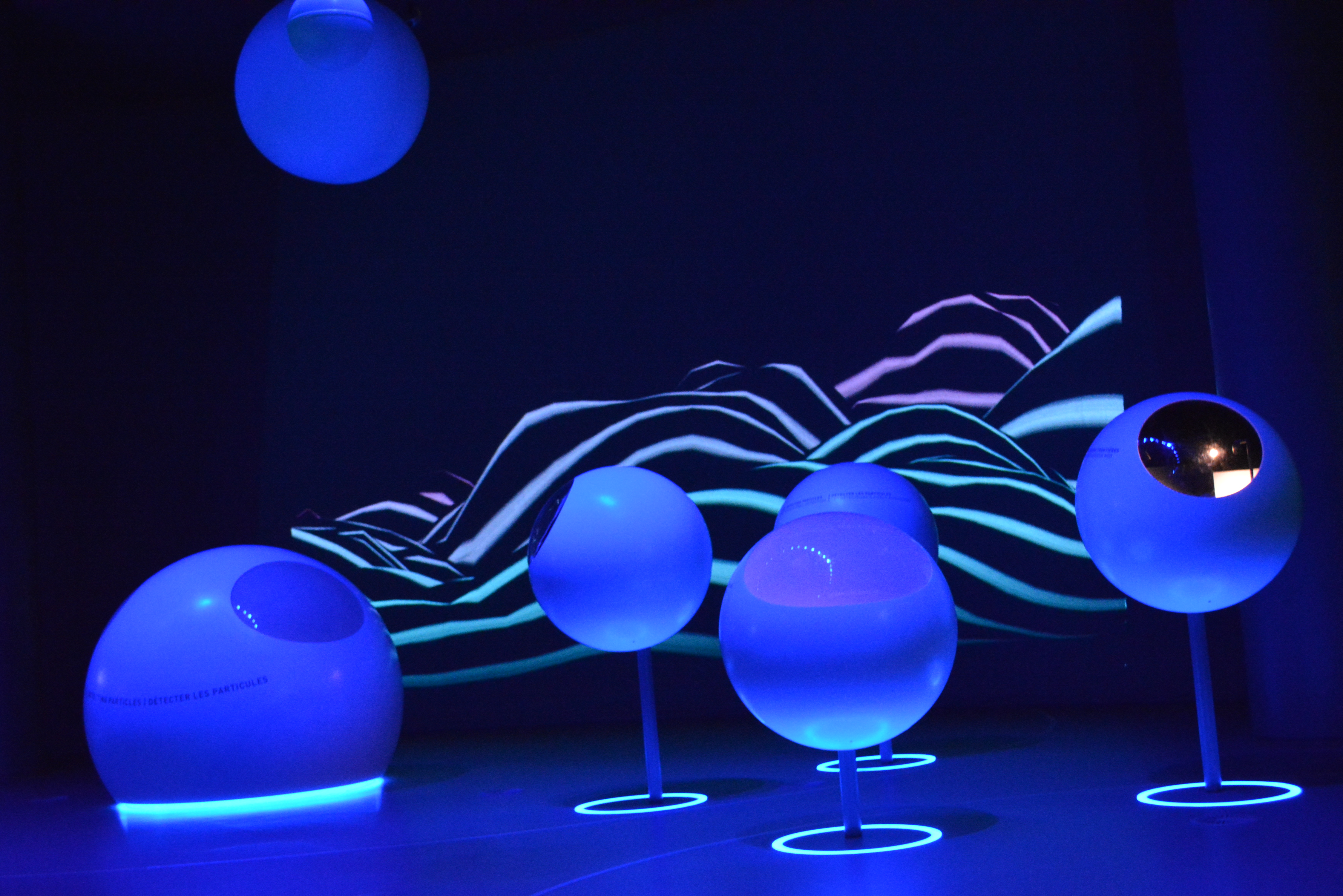 OAI8